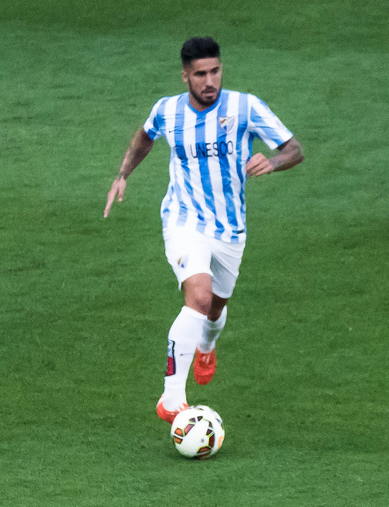 Samuel García Sánchez playing for Malaga in 2015.